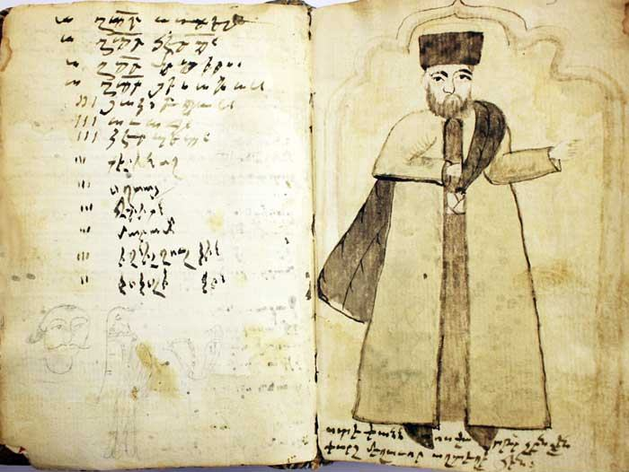 Рукопись армянского историка Степаноса Ереца (1746—1813)